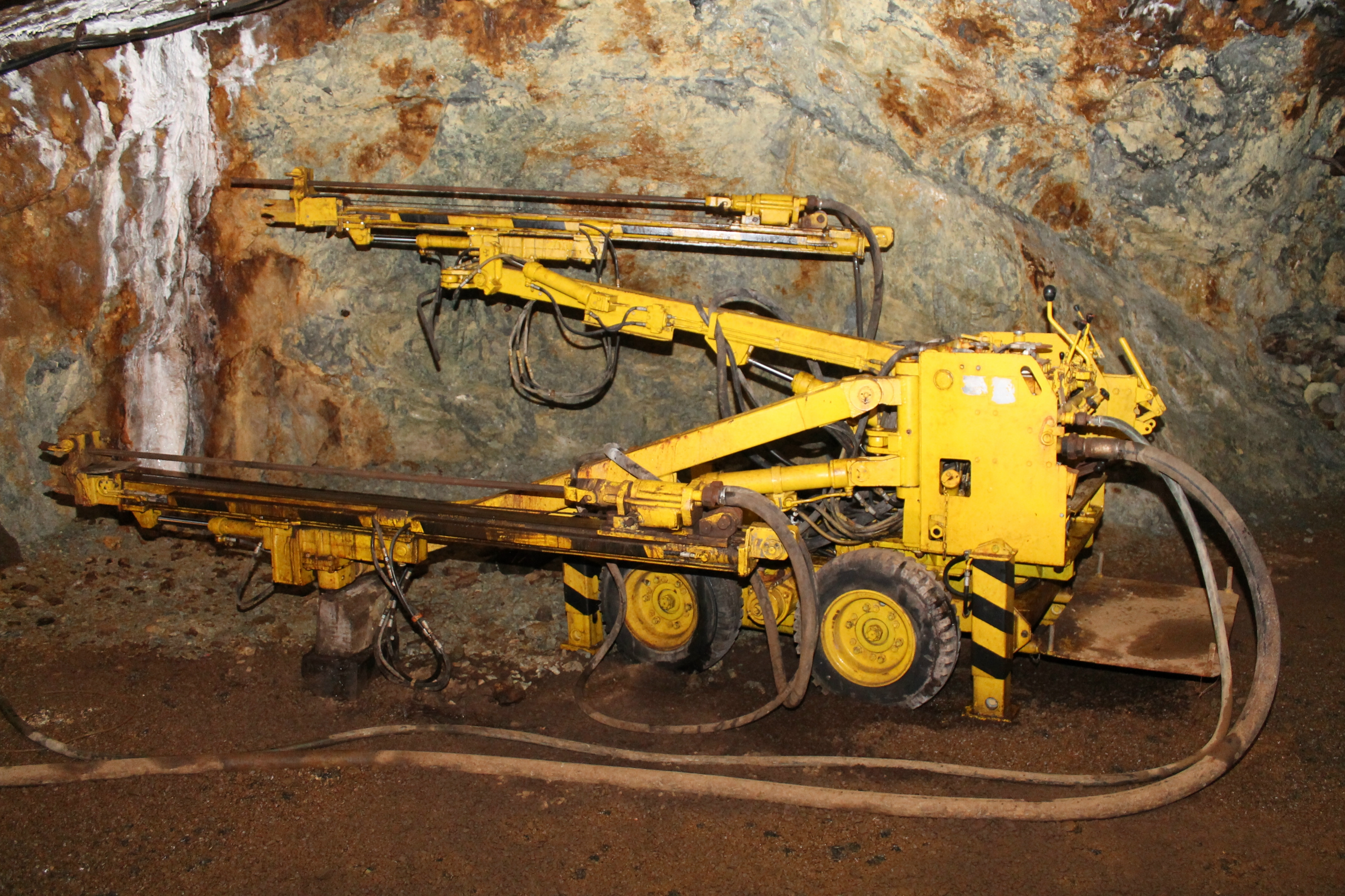 Gleisloser Abbau- bzw. Kleinbohrwagen BWA 3. Besucherbergwerk "Drei Kronen & Ehrt" (Grube Einheit), Elbingerode, Sachsen-Anhalt, Deutschland.